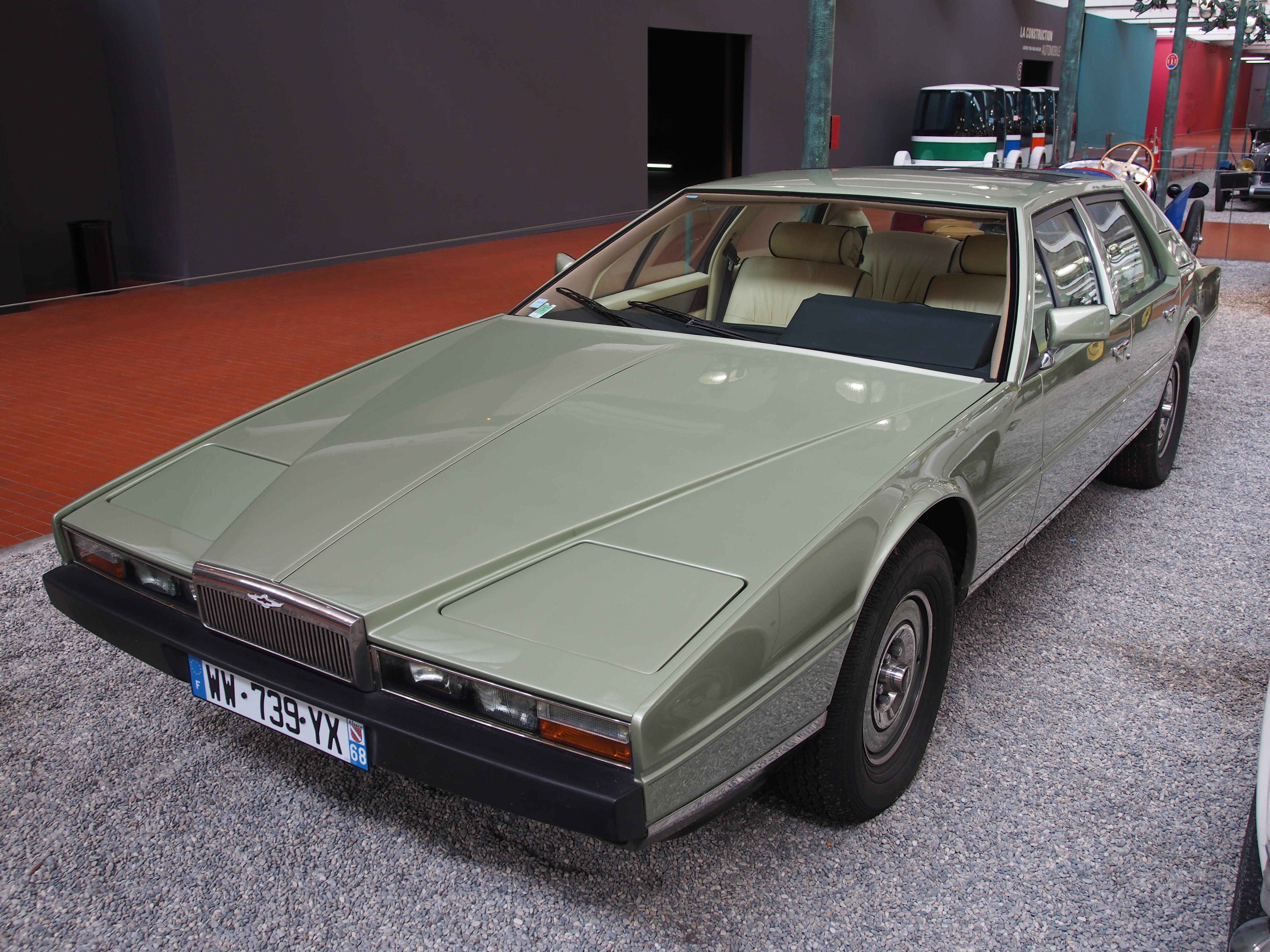 Photographed at Musée National de l'Automobile, France.